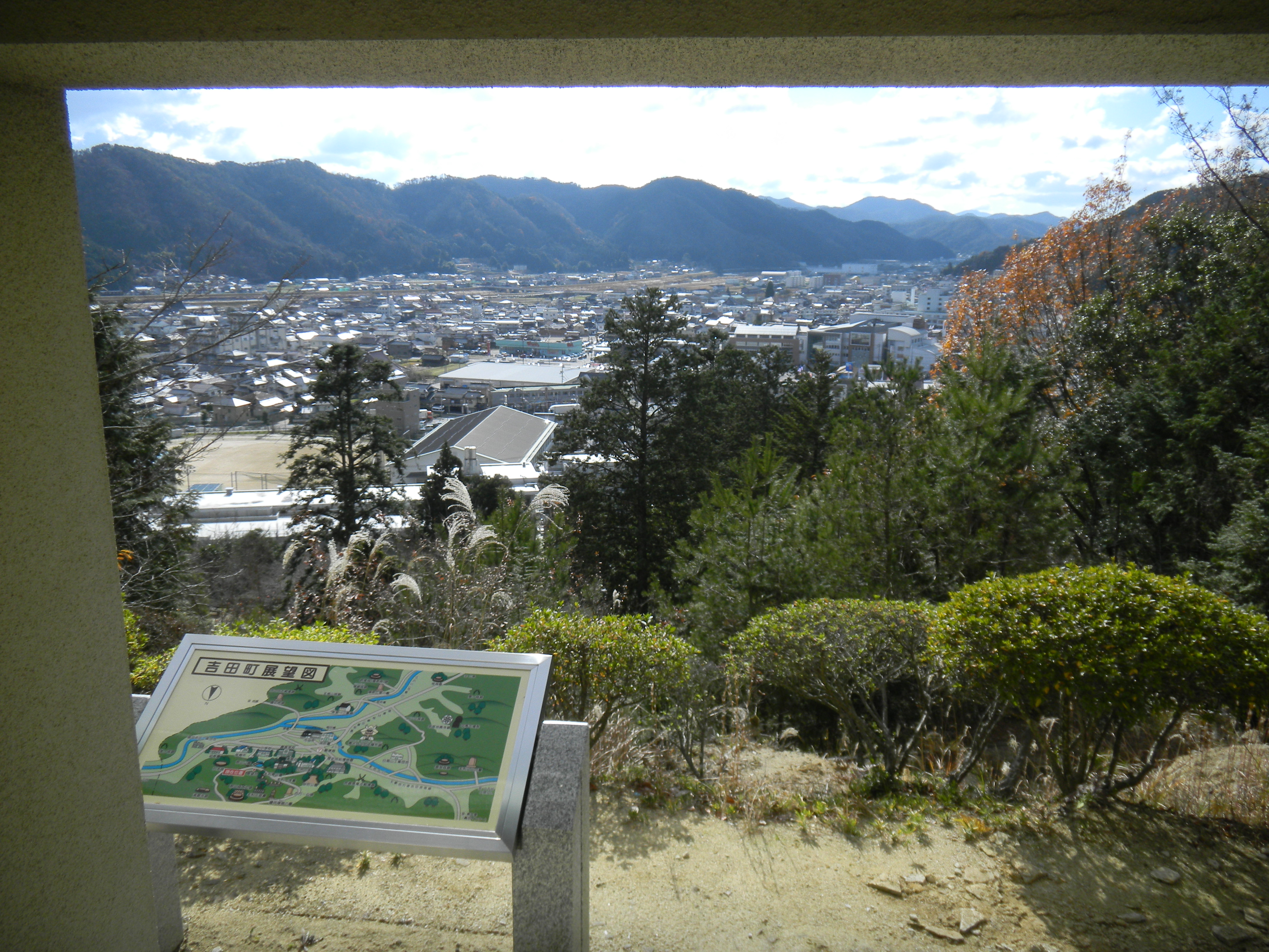 毛利の居城跡から見る吉田町市街